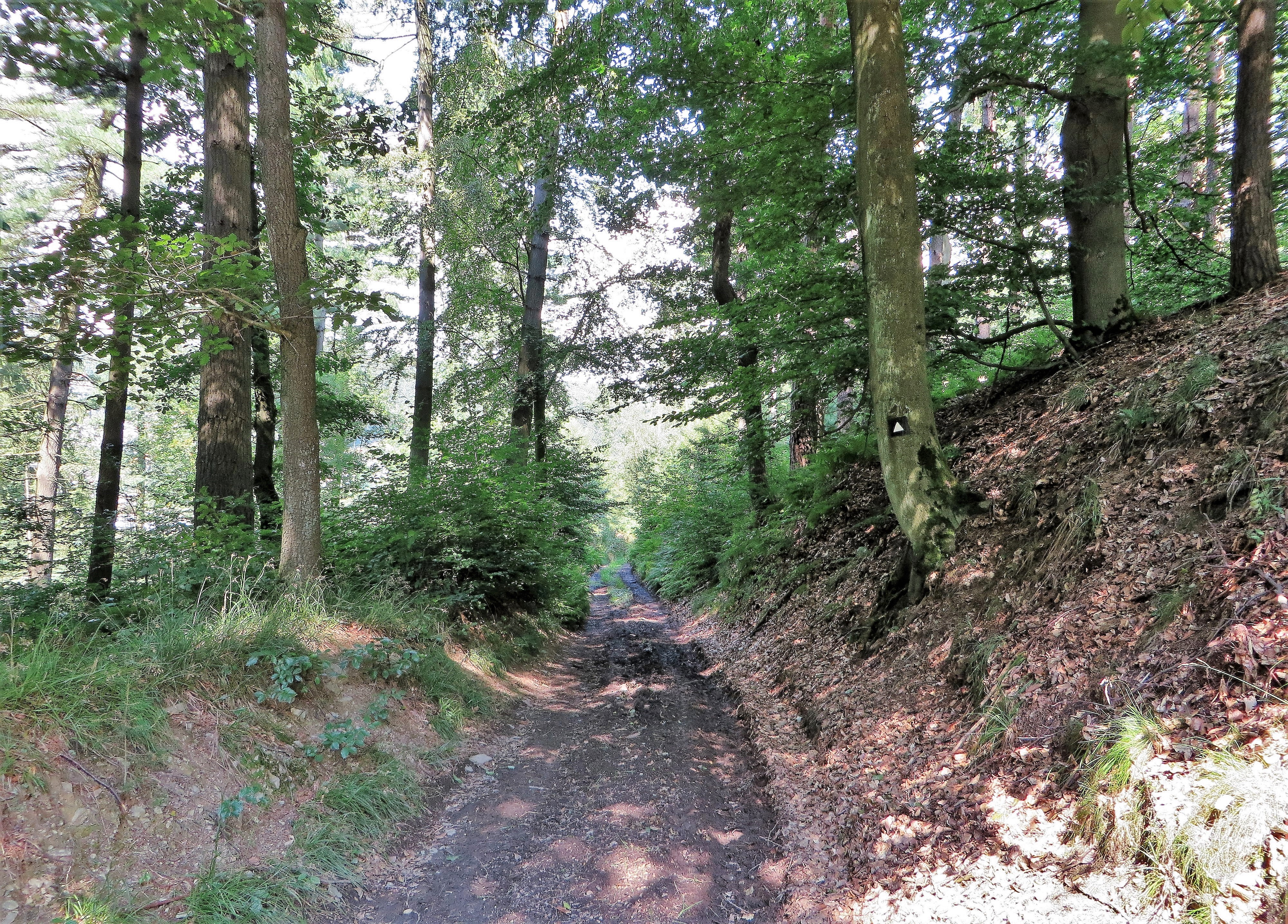 Geschützter Landschaftsbestandteil „Alter Postweg“ in Hagen, zwischen Selbecker Straße und Mäckinger Bachtal bei Selbecke. Es handelt sich um einen gut ausgebildeten Hohlweg mit artenreicher Vegetation im Verlauf des alten Postweges nach Breckerfeld. Es ist ein jahrhundertelang benutzter etwa 3,8 Kilometer langer Weg, nirgends über zwei Meter breit und sehr steil. Im unteren Teilstück beträgt die Steigung auf etwa 320 Meter rund 20 Prozent, die folgende Wegstrecke von etwa 520 Meter bis zum sogenannten Pferdeplatz immerhin noch 16 Prozent. Nach dem Bau der Chaussee 1788–1794, über die heute die L528 verläuft, verödete der „Alte Postweg“ und diente nur noch als Wirtschafts- und Wanderweg. Der Hohlweg liegt im Landschaftsschutzgebiet „Rafflenbeuler Kopf“.